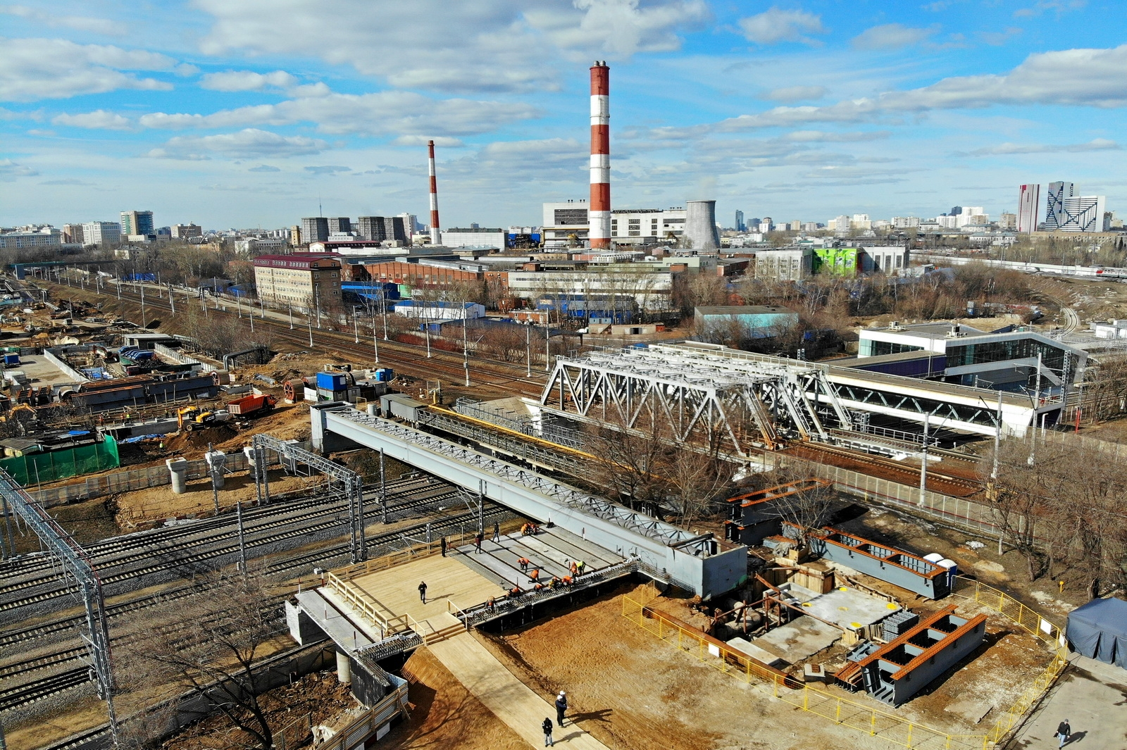 Строительство путепровода через МЦК в районе ул. Пруд Ключики (С. Собянин, М. Хуснуллин; 28.03.2019)